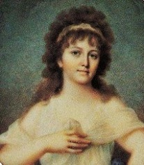 アメリカ合衆国5代大統領ジェームズ・モンロー夫人の肖像画